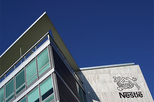 Hauptsitz von Nestlé in Vevey